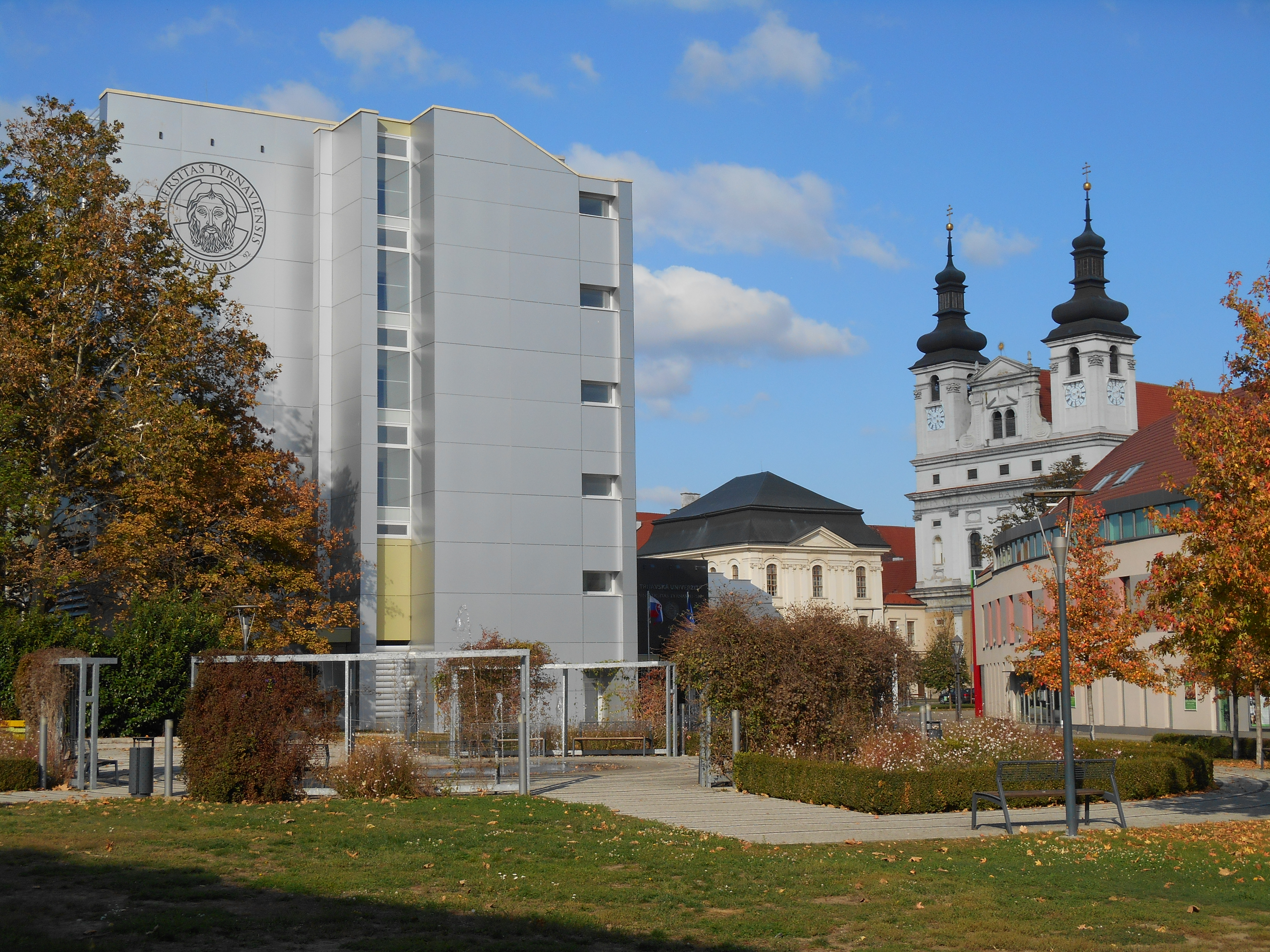 Slovakia - Trnava - Trnavska Univerzita